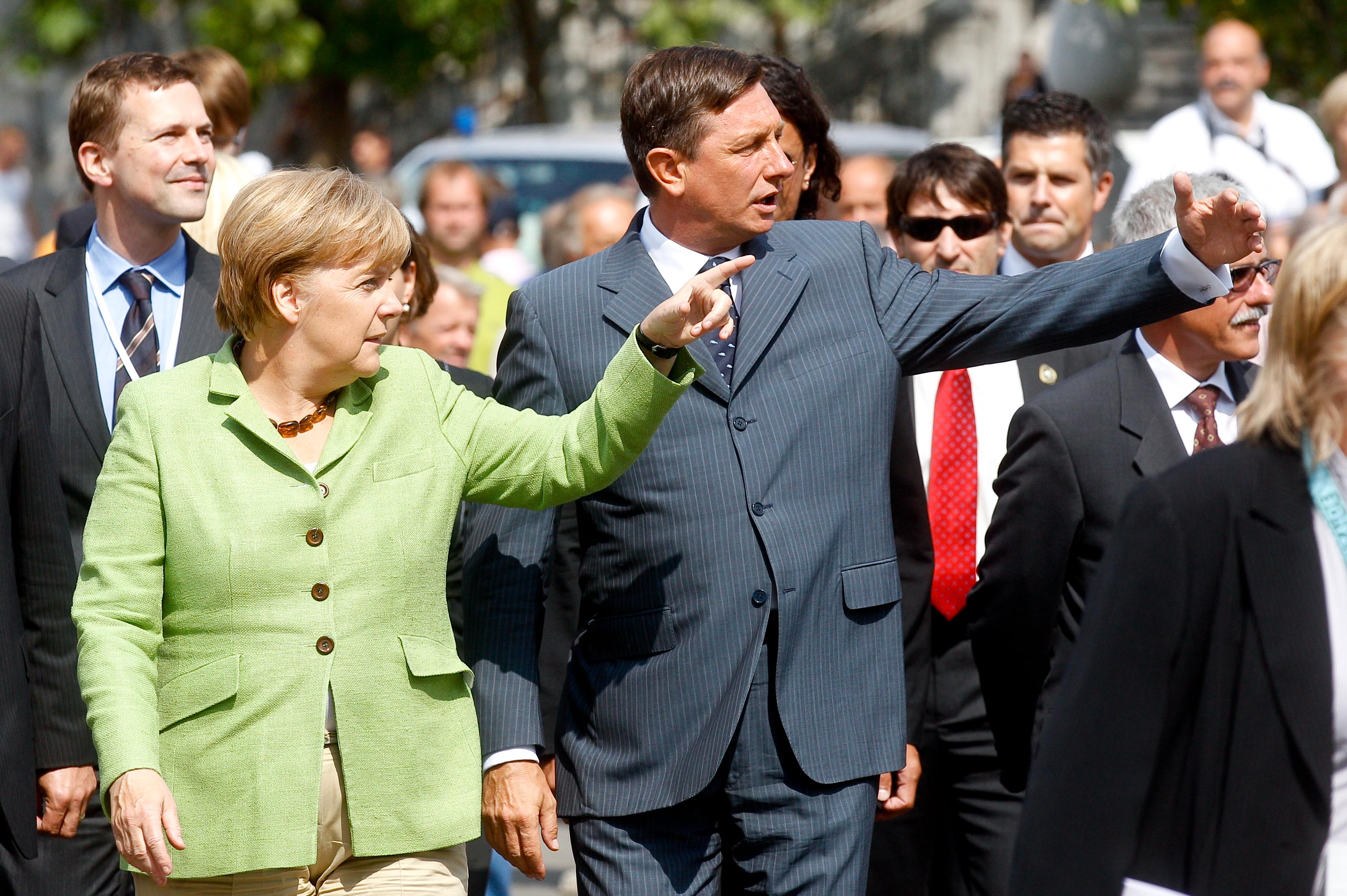 Angela Merkel in Slovenia 2011